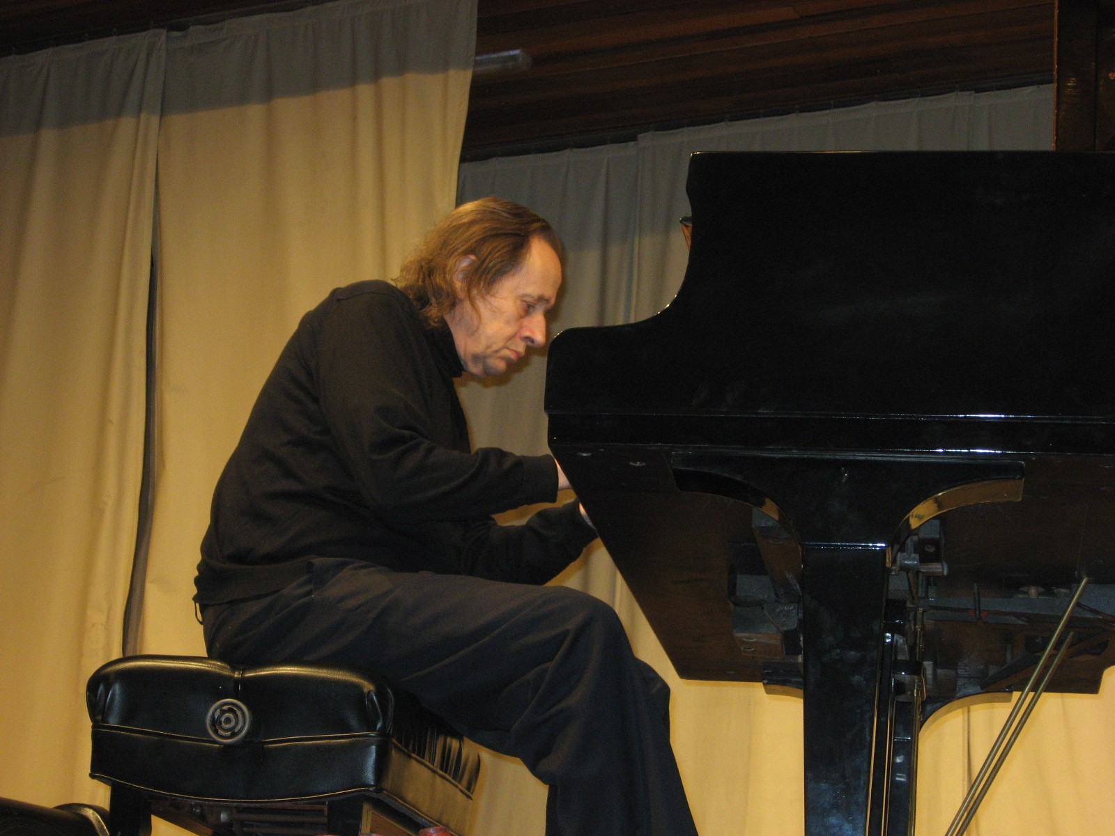 O Maestro brasileiro Arthur Moreira Lima, em concerto feito em Caetité